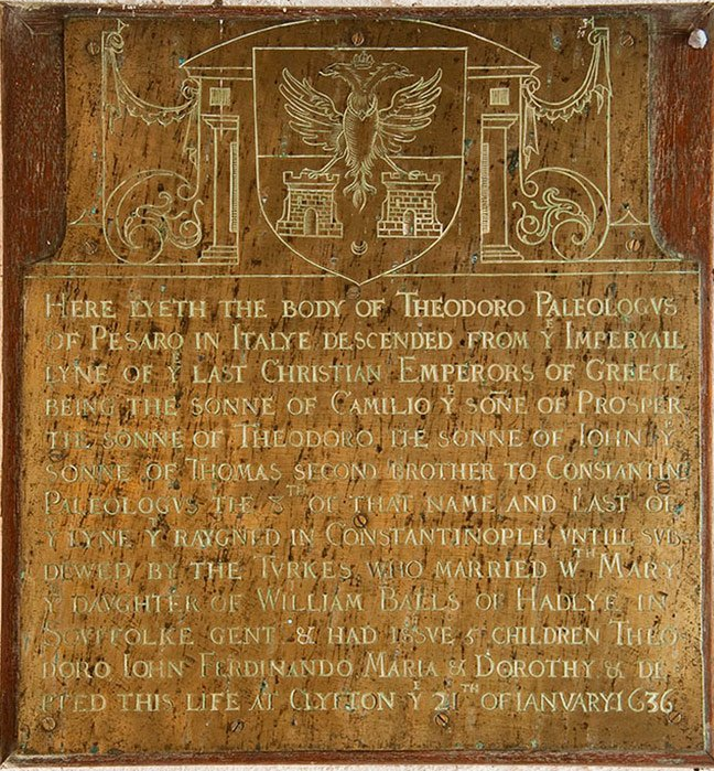 Lapide tombale in ottone di Teodoro [padre] a Landulph nella chiesa di St. Leonard e St. Dilpe. La lapide si trova nel coro e recita così: HERE LYETH THE BODY OF THEODORO PALEOLOGVS / OF PESARO IN ITALY DESCENDEN FROM YE IMPERIAL / LYNE OF YE LAST CHRISTIAN EMPORERS OF GREECE / BEING THE SONNE OF CAMILO YE SONNE OF PROSPER / THE SONNE OF THEODORO THE SONNE OF IOHN / Y SONNE OF THOMAS SECOND BROTHER TO COSTANTIN / PALEOLOGVS THE 8TH OF THAT NAME AND LAST OF / YE LYNE YT RAYGNED IN COSTANTINOPLE VNTILL SVB / DEWED BY THE TURKES WHO MARRIED WITH MARY / YE DAUGHTER OF WILLIAM BALLS OF HADLYE IN / SOUFFOLKE GENT. & HAD ISSVE 5 CHILDREN THEO / DORO IOHN FERDINANDO MARIA & DOROTHY & DEPARTED THIS LIFE AT CLYTON YE 21YH OF IANVARY 1636. (Qui giace il corpo di Teodoro Paleologi [padre] di Pesaro in Italia; discendente dalla linea imperiale degli ultimi imperatori cristiani della Grecia. È il figlio di Camillo, figlio di Prosper, figlio di Teodoro, figlio di Giovanni, figlio di Tommaso secondo fratello di Costantino Paleologi 8° di questo nome e l'ultimo che ha regnato a Costantinopoli fino alla conquista da parte dei turchi; ha sposato Mary, figlia di William Balls di Hadley in Souffolke Gent e aveva 5 figli: Teodoro [seppellito in Westminster Abbey], Giovanni, Ferdinando [seppelito alle Barbados] Maria e Dorothea e finisce questa vita a Clyton il 21 gennaio [sic!] 1636.)